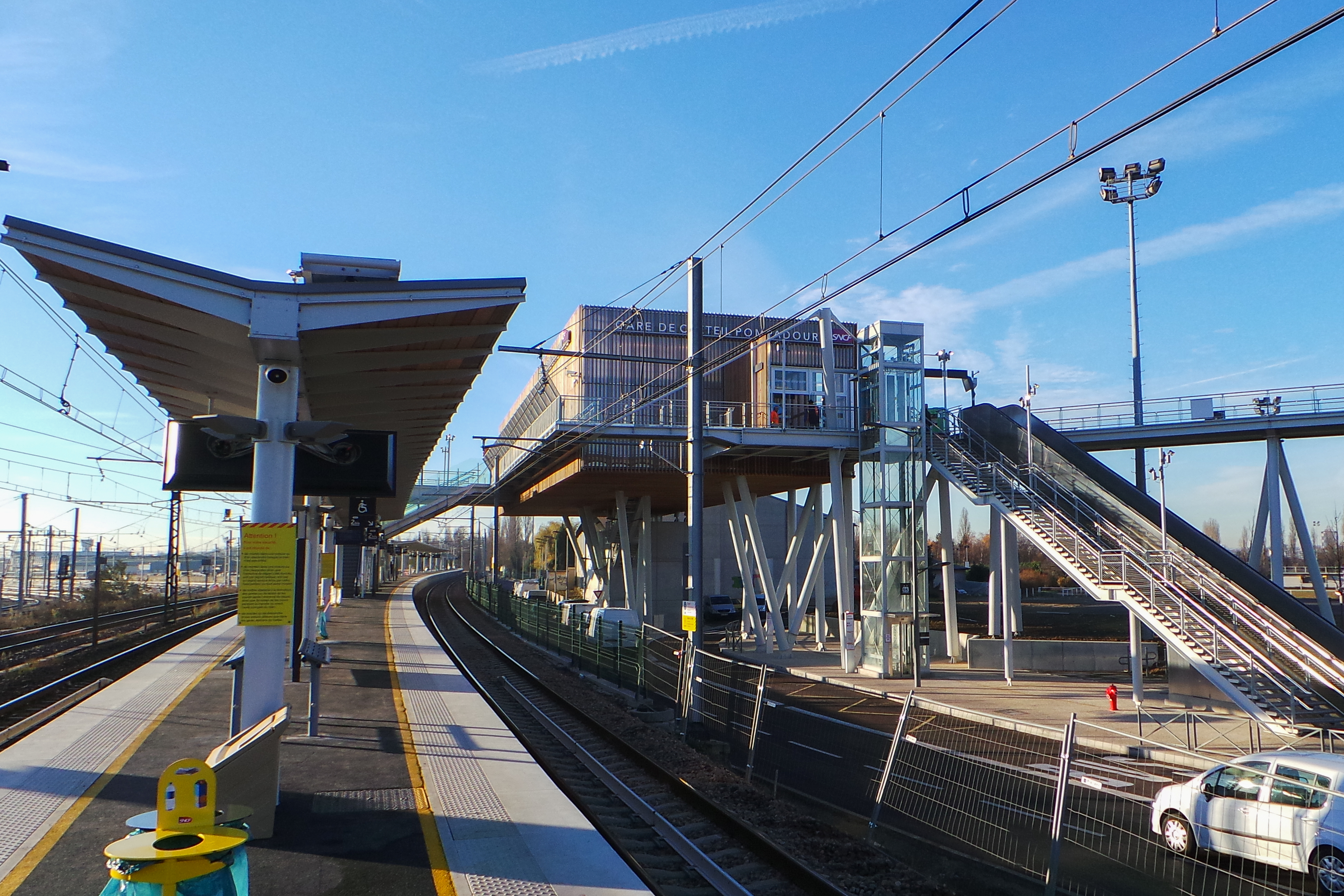 Gare de Créteil-Pompadour / RER D / Créteil, Val-de-Marme, France